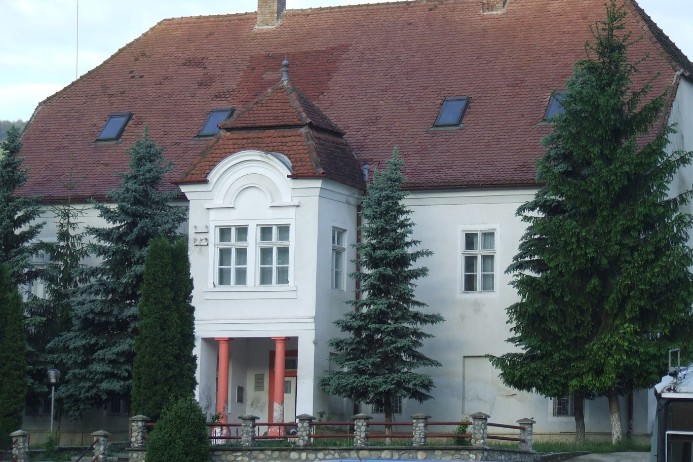 Castle in Nadaşel, Cluj County, Romania